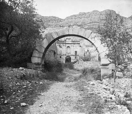 Imatge